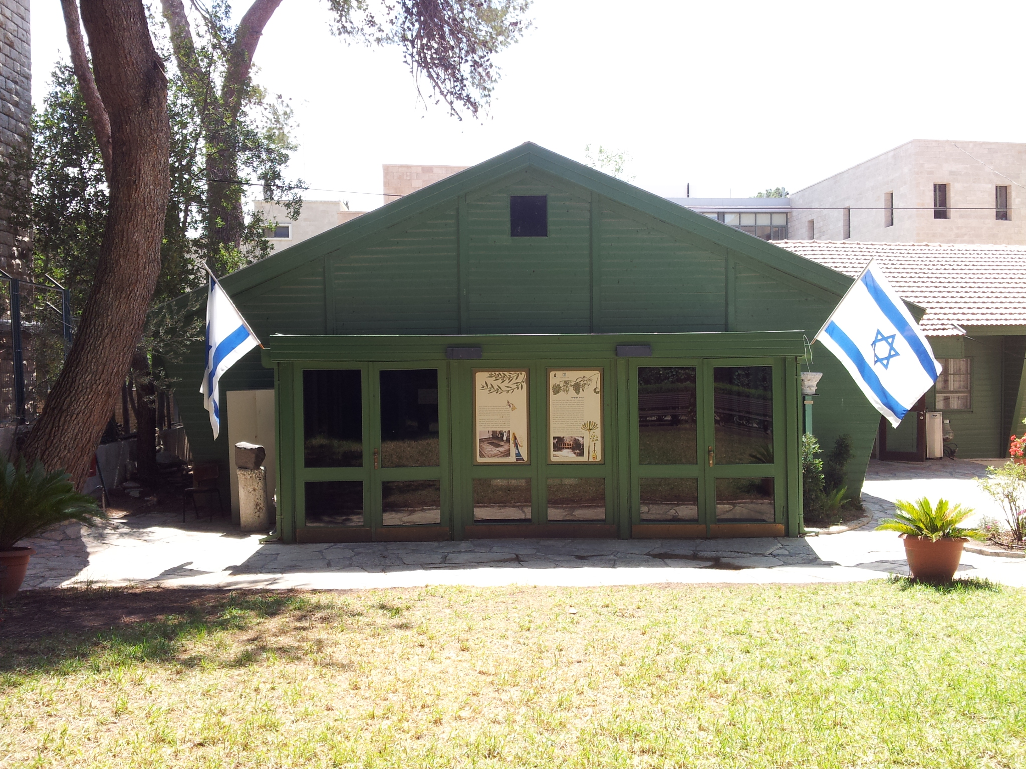 צריף הנשיא במתחם יד יצחק בן צבי בירושלים